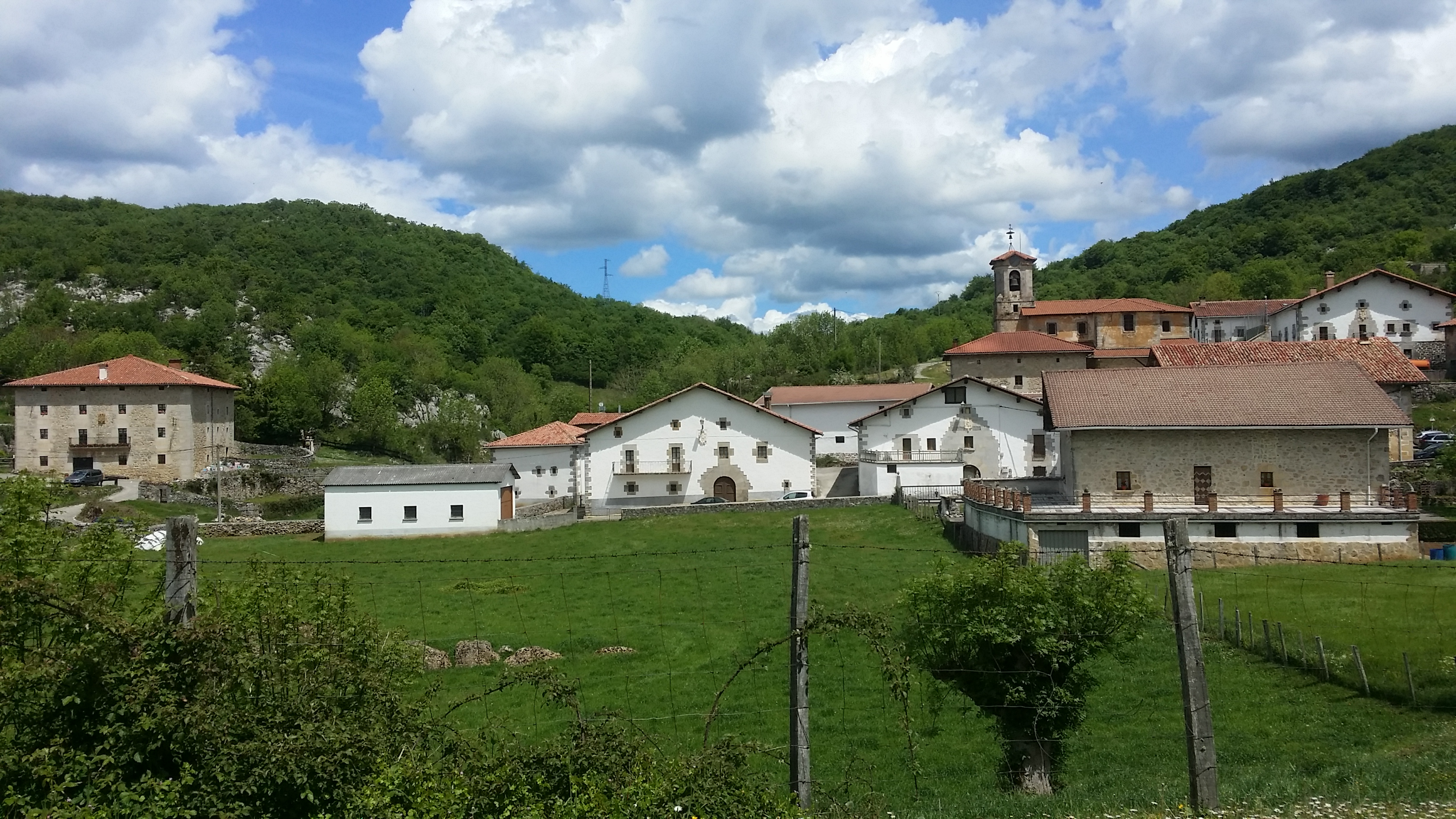 Madotz herriko ikuspegi orokorra.